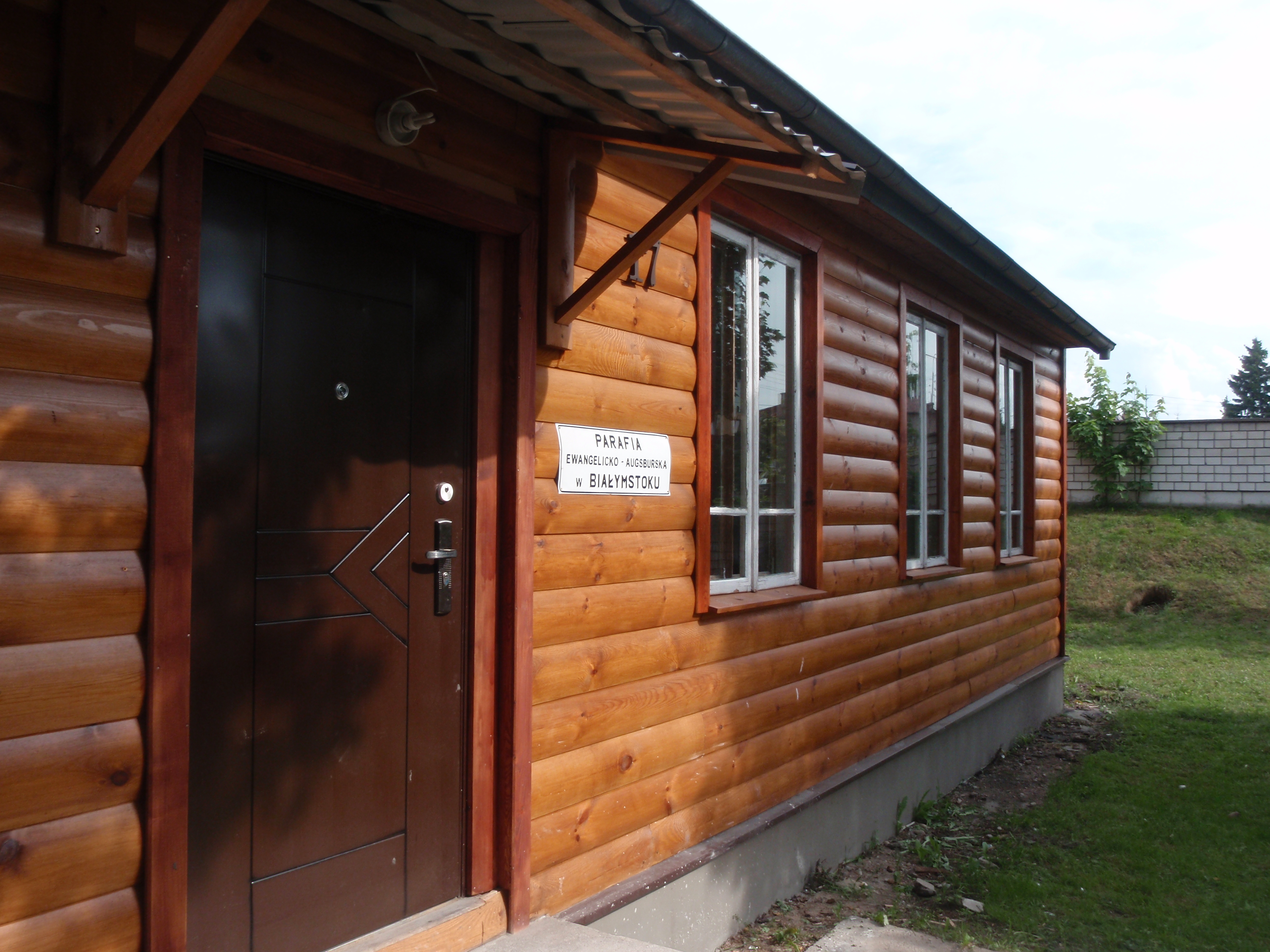 wejście do centrum parafialnego parafii ewangelicko-augsburskiej w Białymstoku